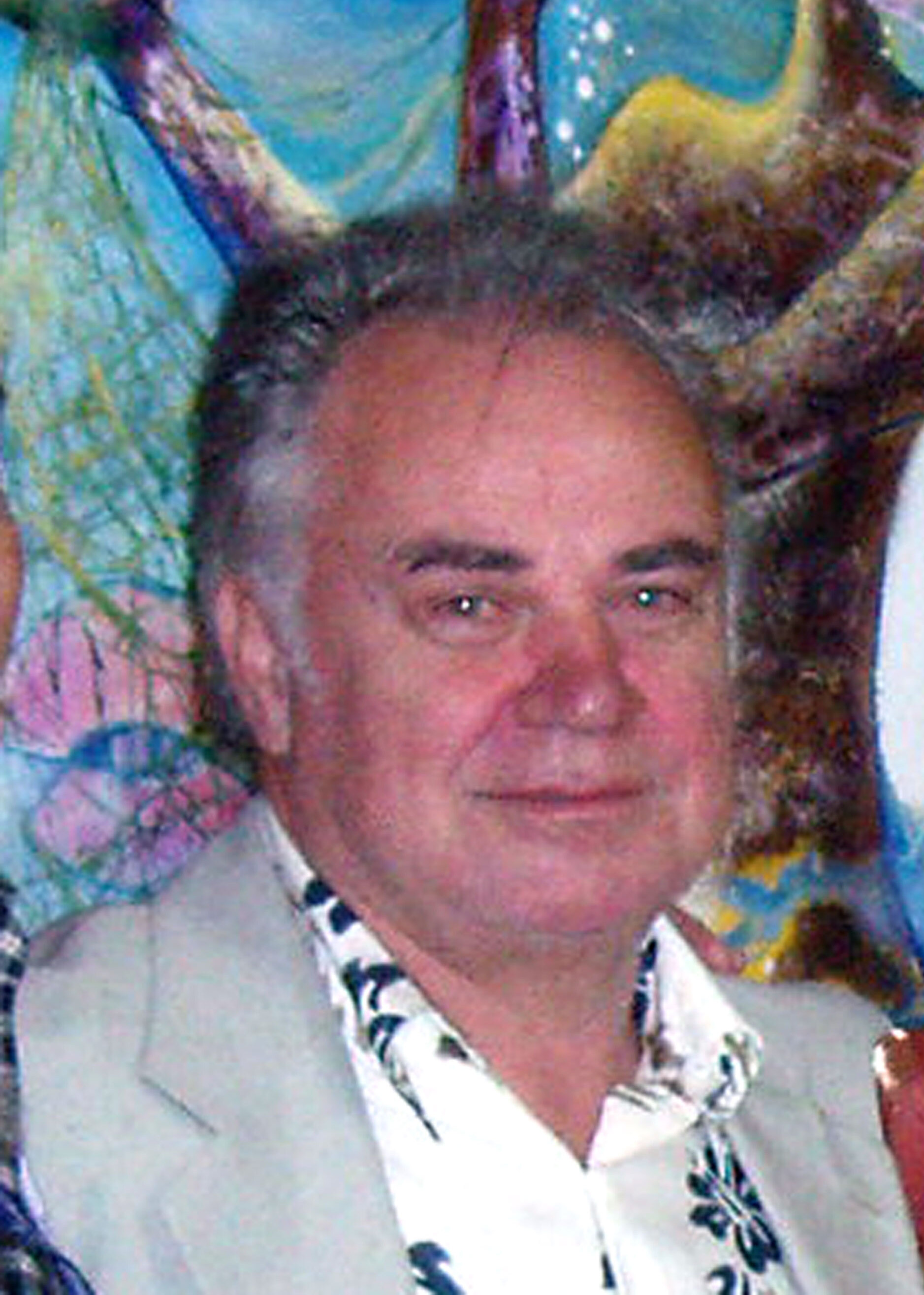 Retrato del artista Bernard Romain durante una muestra